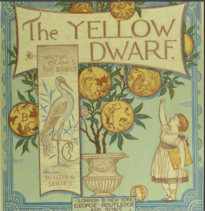 Walter Crane, The yellow dwarf : cover. Le nain jaune, version anglaise du conte de Mme d'Aulnoy, 1875